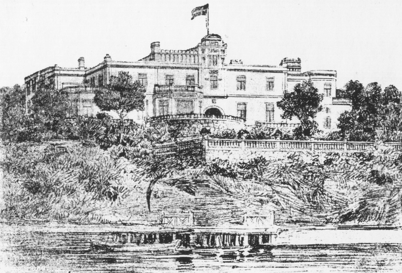 Bobergs tuschteckning för Oakhill